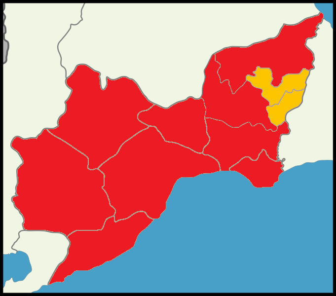 Tekirdağ'da 2014 Türkiye cumhurbaşkanlığı seçimi